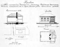 Беларуская (тарашкевіца): Чарэя (Čareja). Сынагога